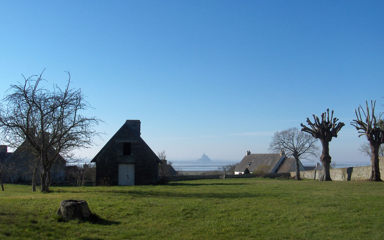 Vains et le Mont-Saint-Michel en arrière plan